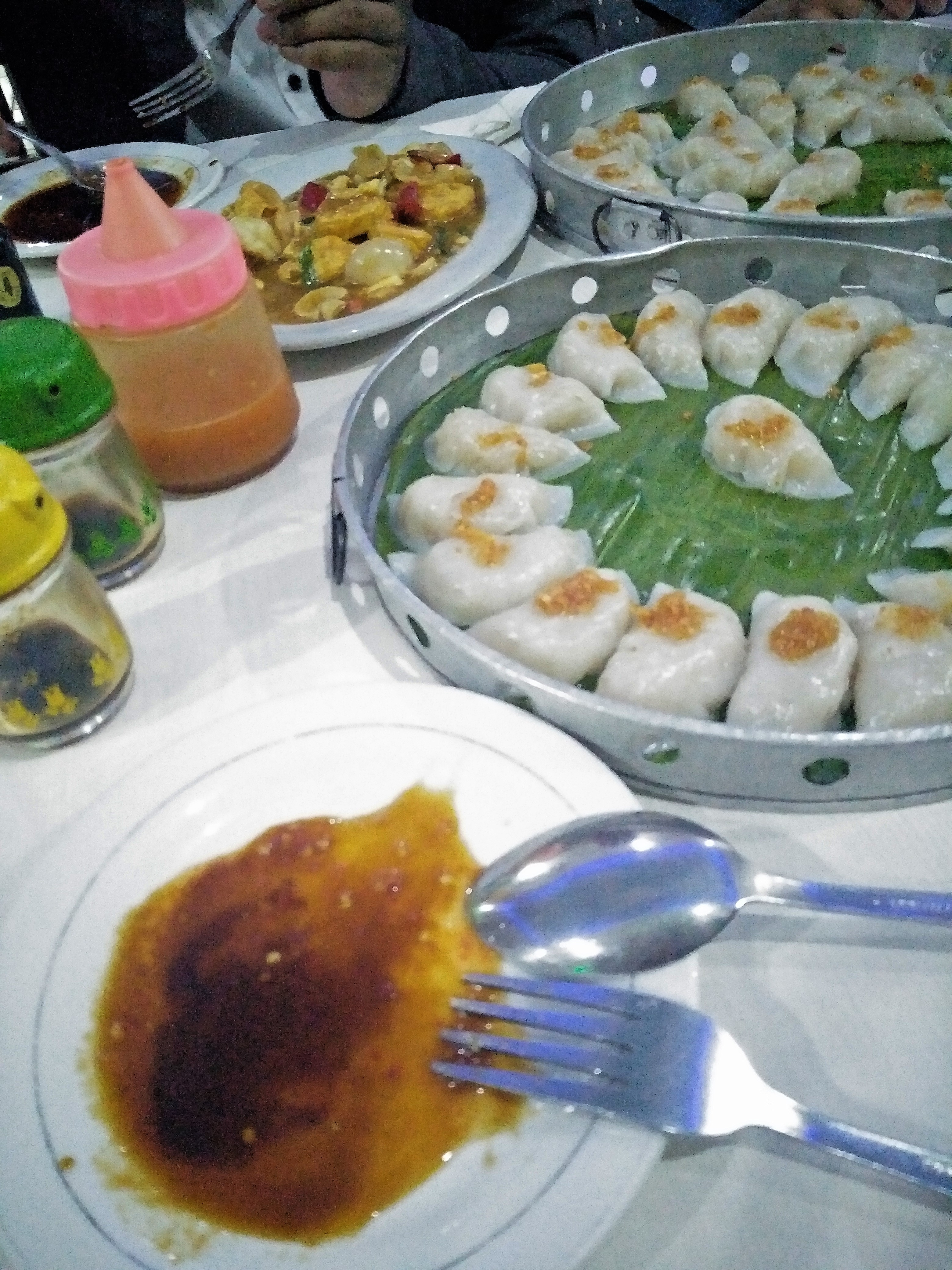 Masakan khas Pontianak Choi Pan yang disajikan dengan bumbu yang menyerupai cuka